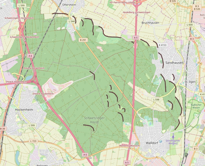 Lage der Binnendünen in der Schwetzinger Hardt - nur die markantesten Erhebungen sind markiert. Deutlich wird aber auf Anhieb dass sie alle nordöstlich ausgerichtet sind, da die Hauptwindrichtung seit jeher aus südwesten kommt (Grundlage der Markierungen TK25 - 6617 Schwetzingen) This map may be incomplete, and may contain errors. Don't rely solely on it for navigation.